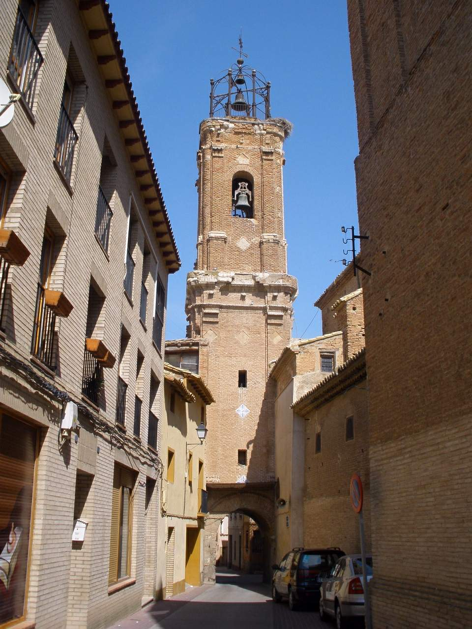 Church of de Nuestra Señora de los Ángeles, Pedrola (Zaragoza, Aragón, España)